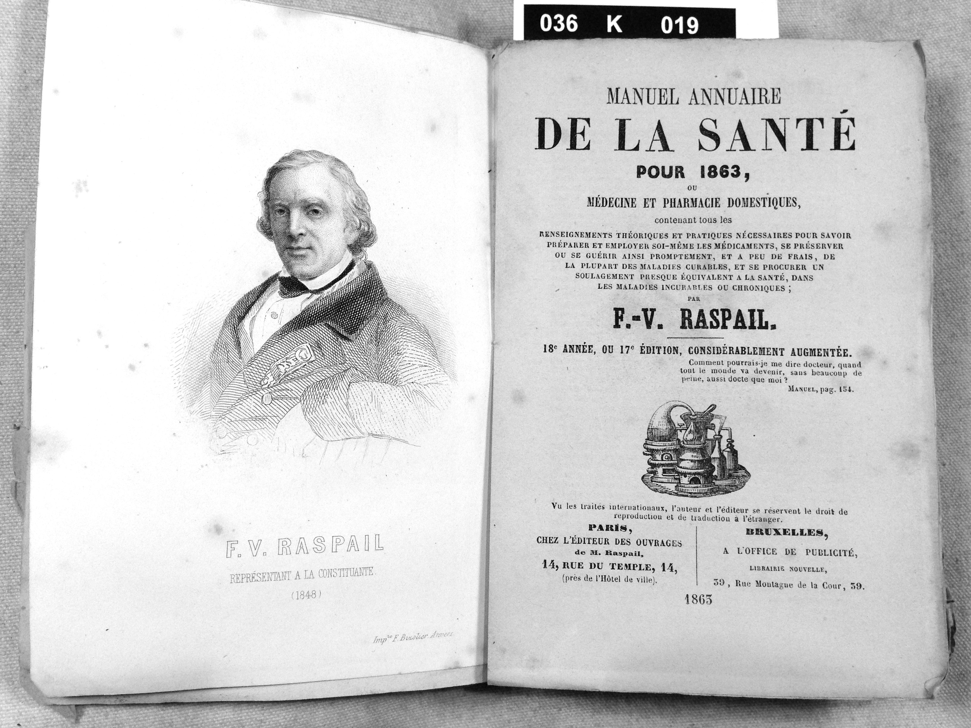 FV Raspail, titelpagina uit zijn "Manuel annuaire de la santé" uit 1863